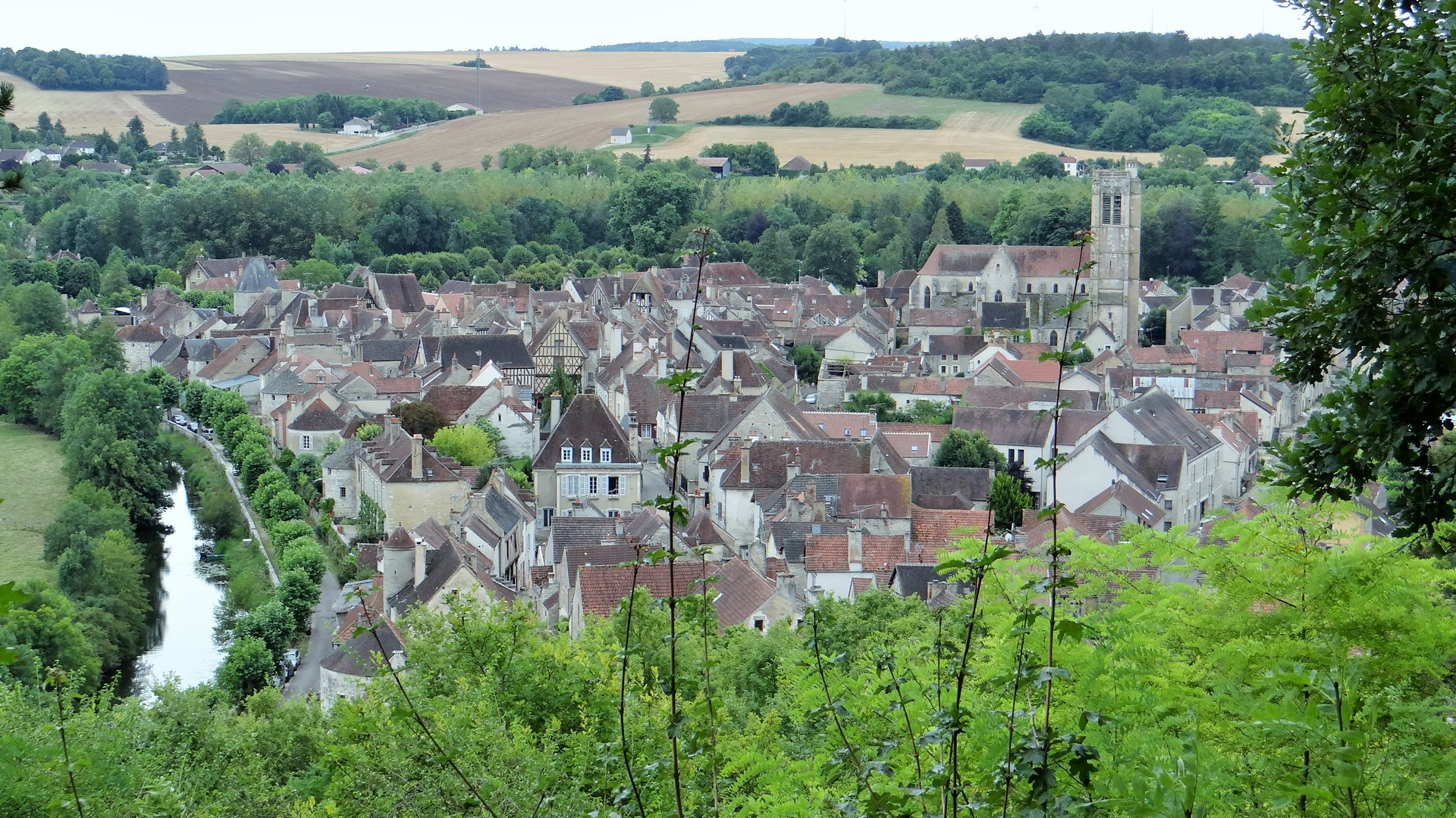 Église et village de Noyers-sur-Serein, Yonne, Bourgogne, France. Vue vers le sud depuis le vieux château de Noyers-sur-Serein. La Cure coule en s'éloignant - elle commence ici un grand méandre qui entoure presque entièrement le village. En arrière-plan contre le bord gauche de la photo, le hameau dit "le Faubourg" où se trouve le cimetière. .